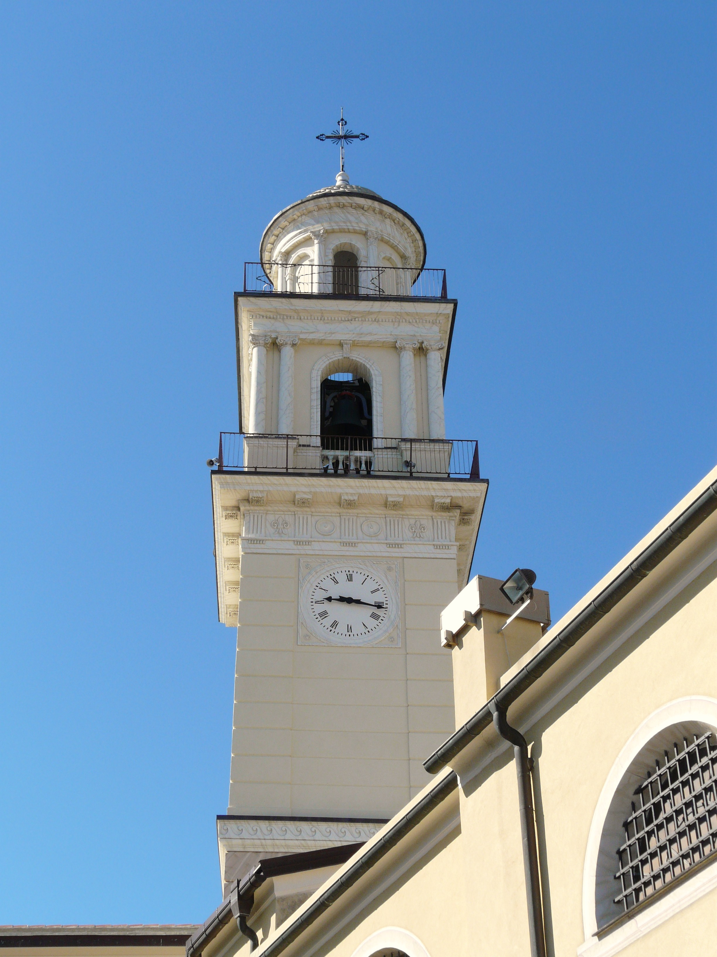 Campanile del santuario di Nostra Signora Incoronata, Coronata, Genova, Liguria, Italia